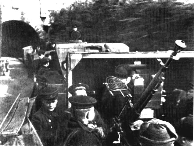 Бронепоезд "Железняков"(известен как "Зеленый призрак"). Севастополь. 1942)